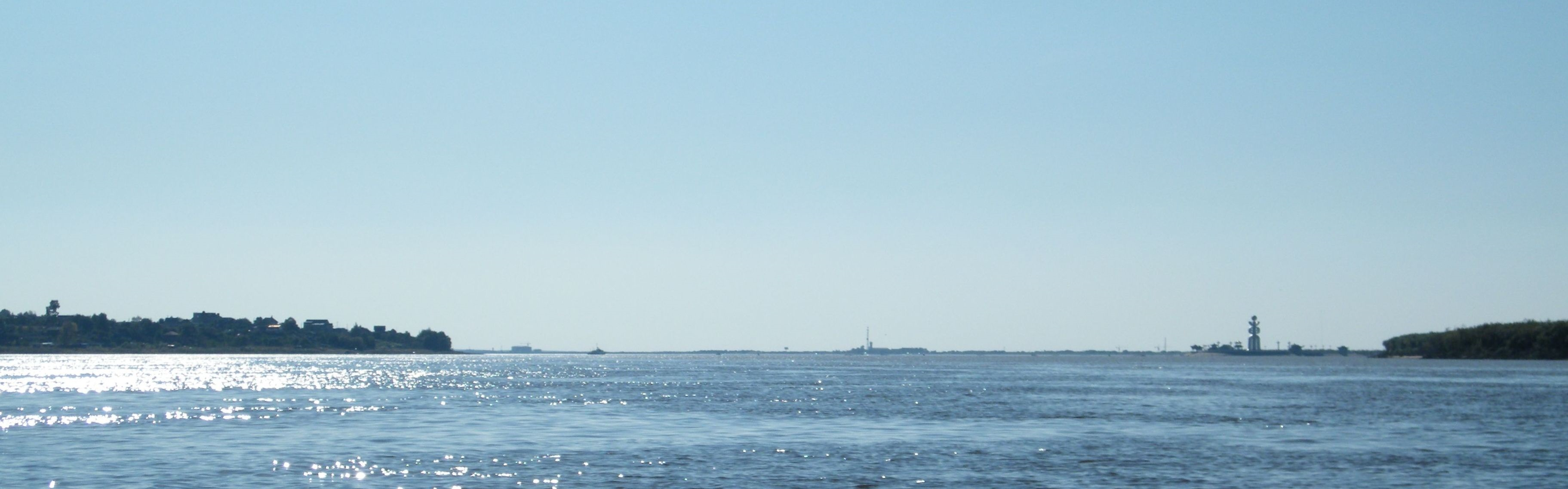 Амурская протока и село Казакевичево сент 2014